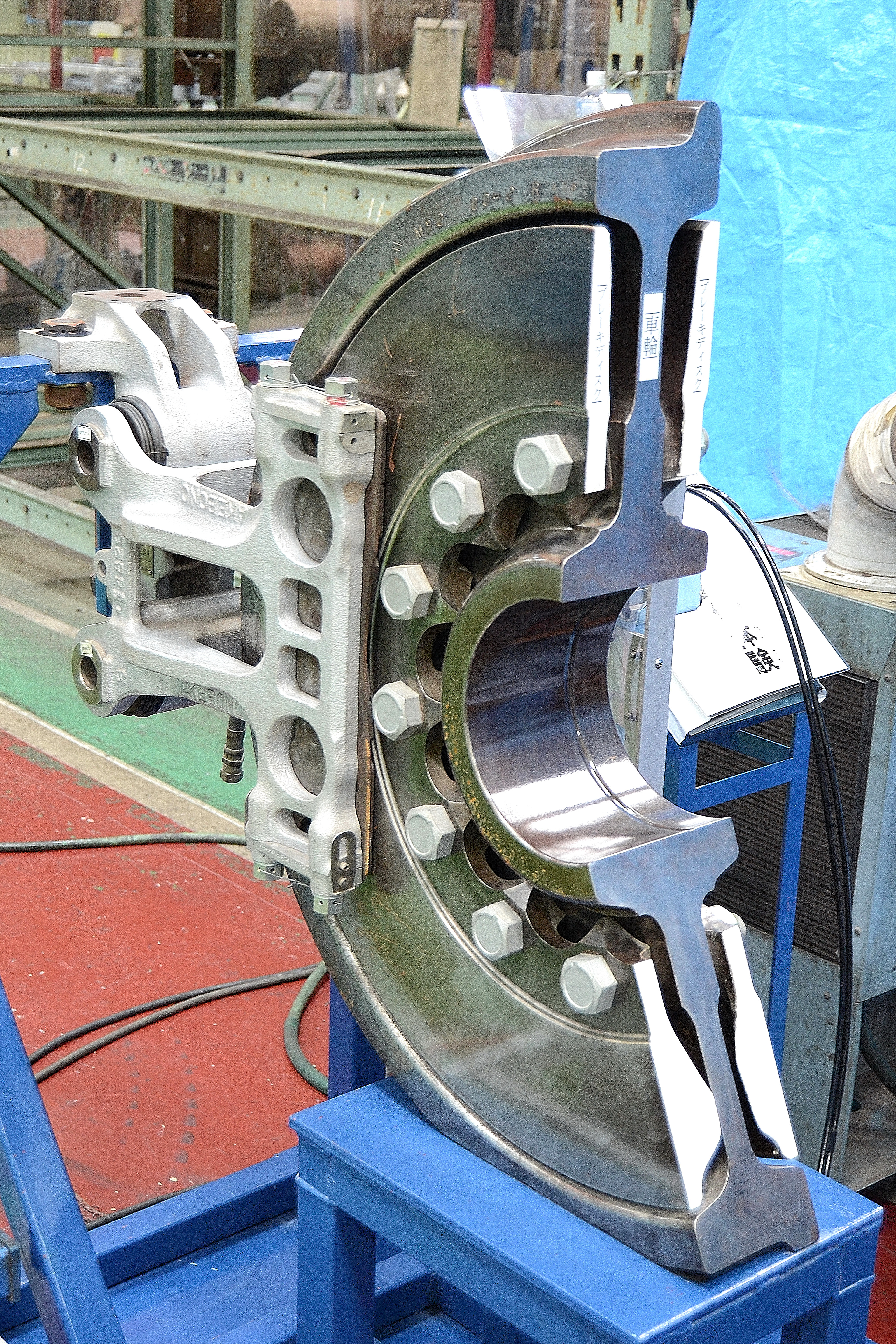 700系に使用されている車輪ディスクブレーキのカットモデル（2014年、浜松工場で開催された新幹線なるほど発見デーにおいて撮影）。